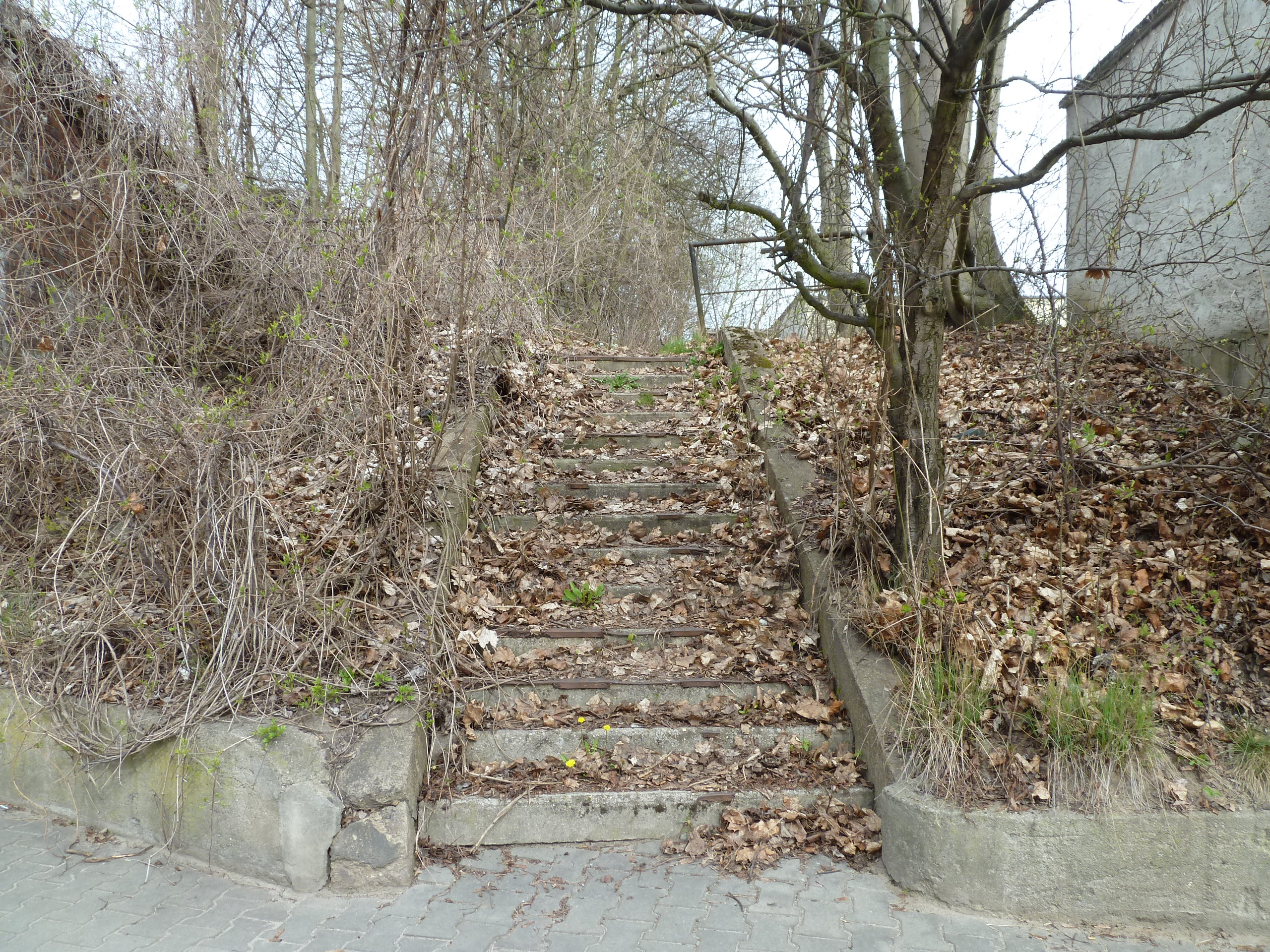 Frankfurt Rangierbahnhof, Zugang zum früheren Haltepunkt Paulinenhof